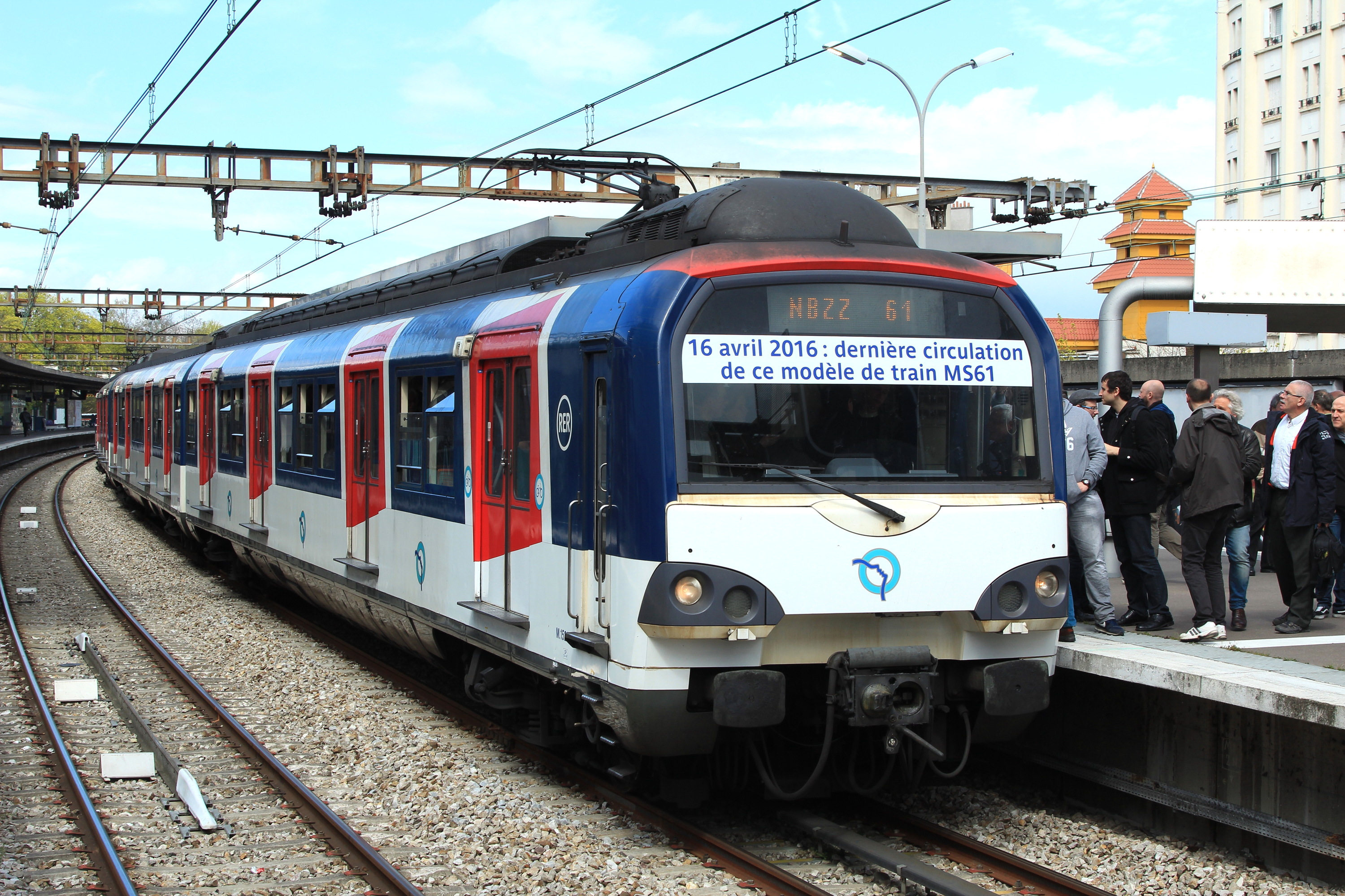 Arrêt prolongé du dernier train en MS 61 sur le RER A, à Joinville-le-Pont, en Île-de-France.